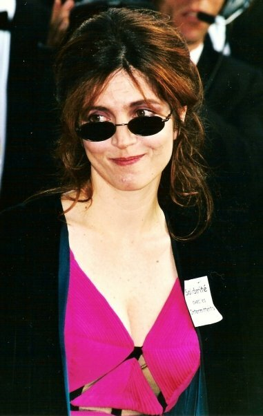 Agnès Jaoui, actrice française, au festival de Cannes